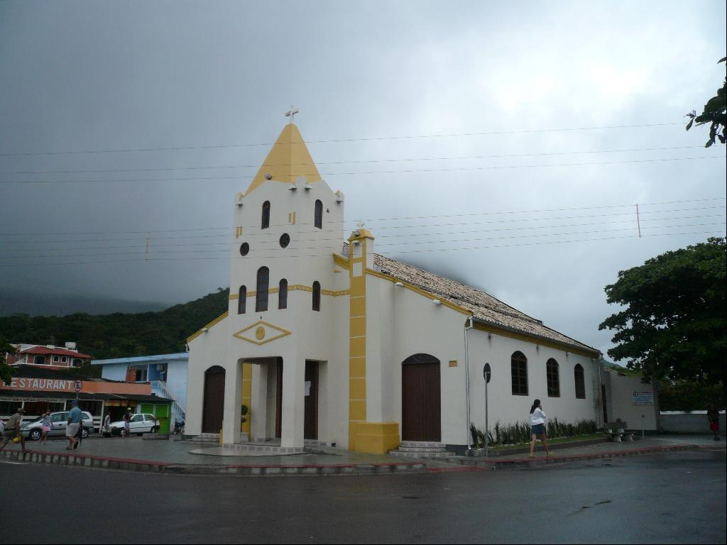 Igreja de Sant'Anna, contruída em 1772.